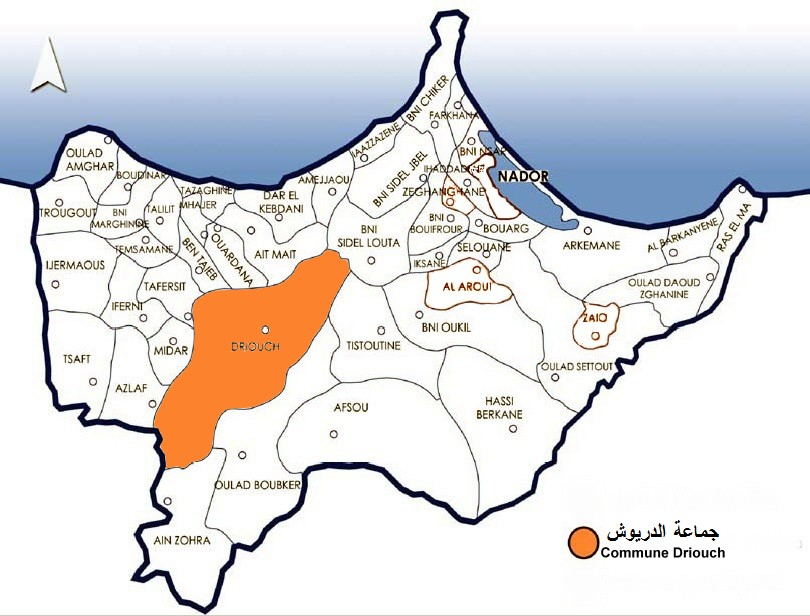 جماعة الدريوشCommune Driouch